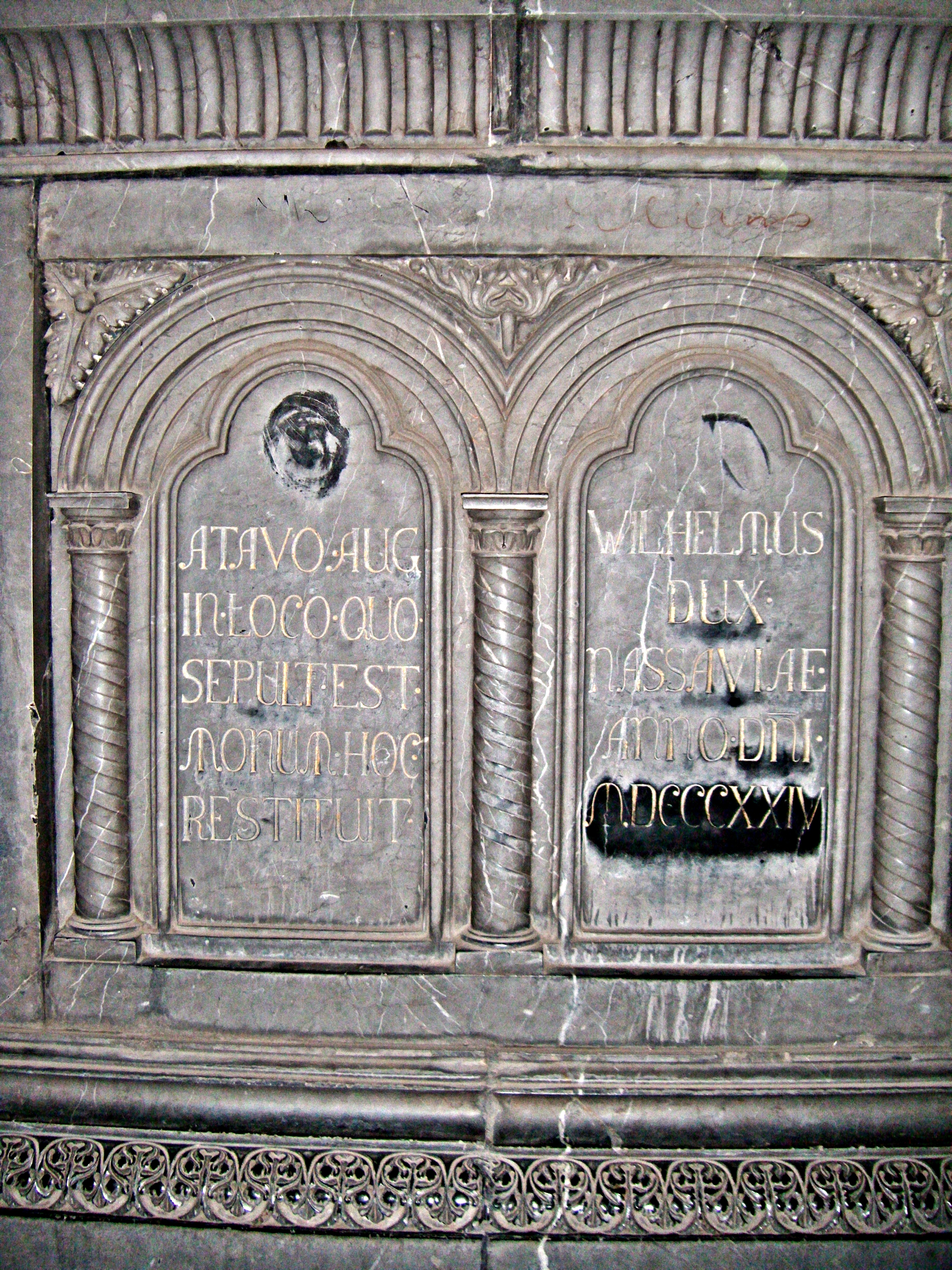 Widmungsinschrift von Herzog Wilhelm I. von Nassau, am Grabmal des Königs Adolf von Nassau, im Speyerer Dom, 1824; nach einem Entwurf von Leo von Klenze